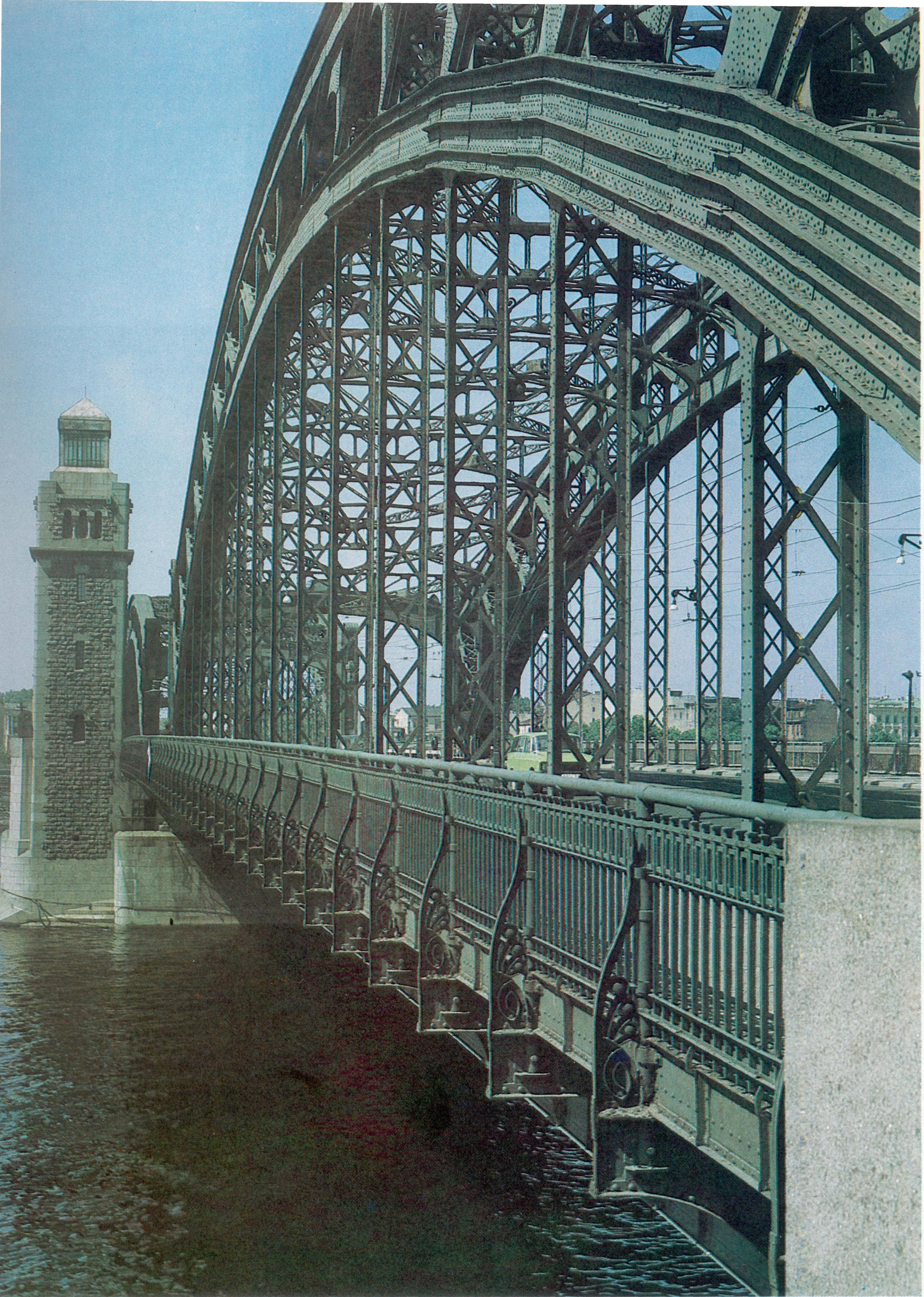 Категория:Изображения:Санкт-Петербург